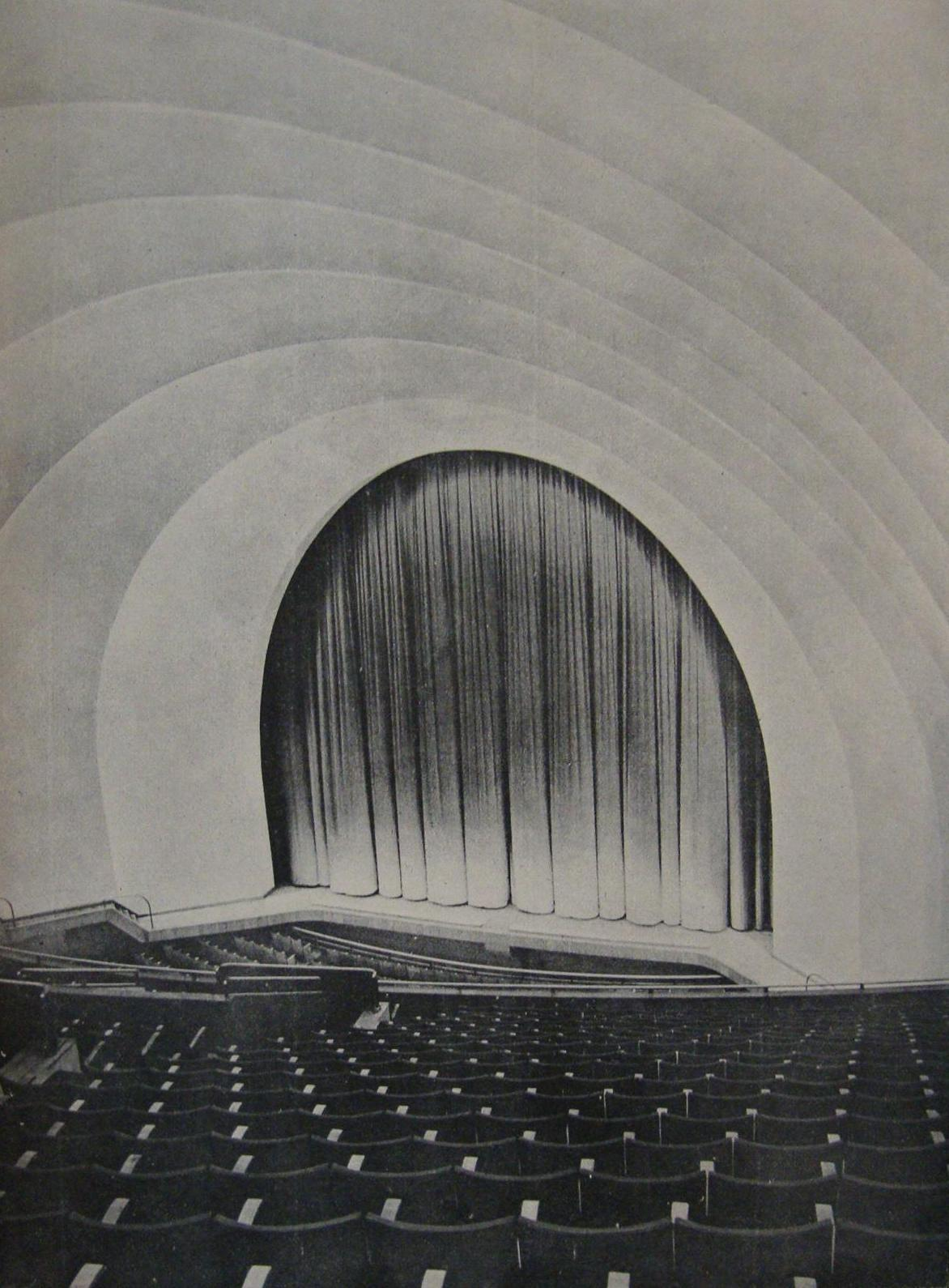 Sala del Cine-Teatro Gran Rex en 1937. Avenida Corrientes nº 857. Arquitecto Alberto Prebisch e ingeniero civil Adolfo Moret.